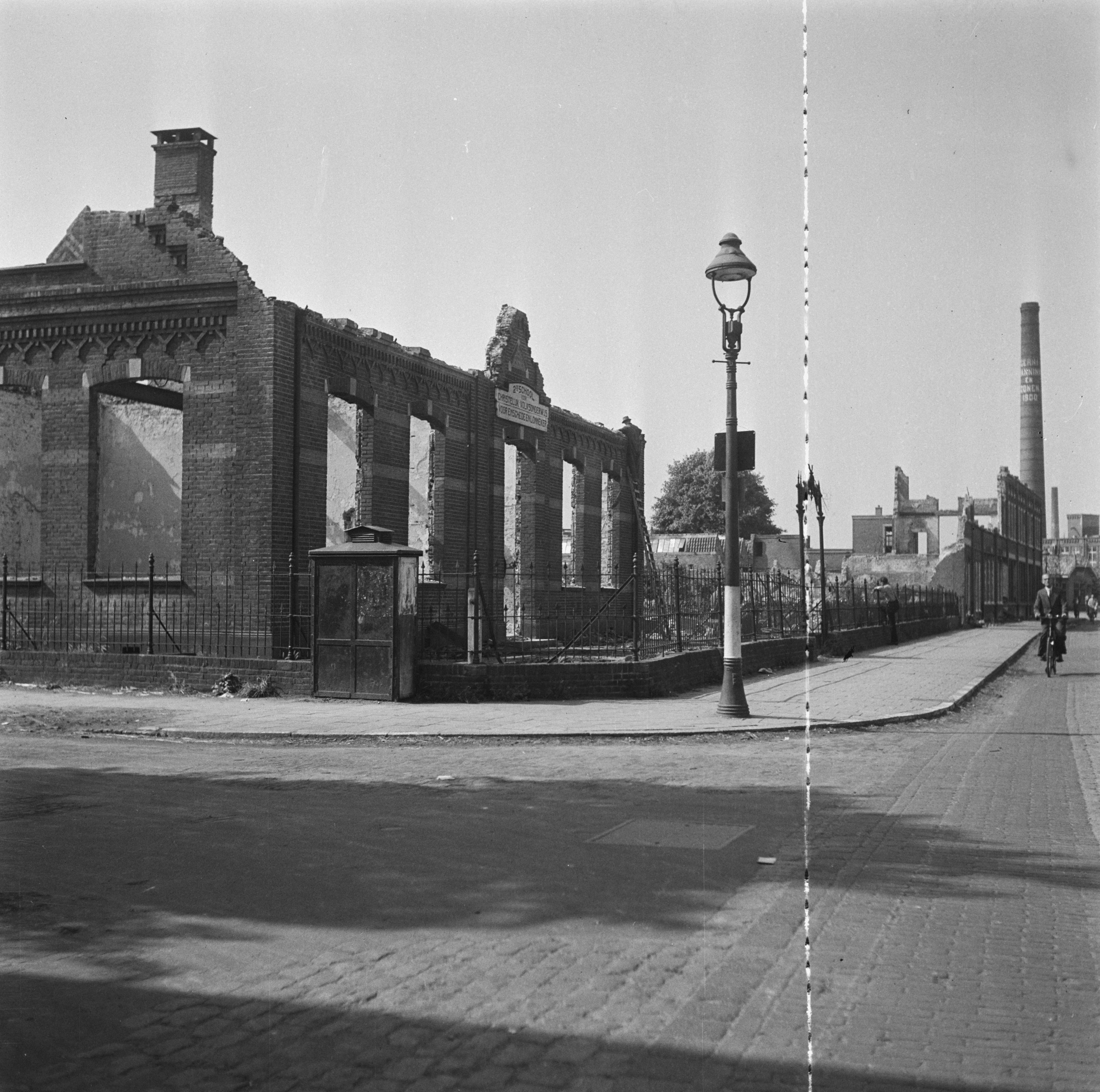 Collectie / Archief : Fotocollectie Anefo Reportage / Serie : Vernielingen: Enschede Beschrijving : Ruïne van de 2de school voor Christelijk Volksonderwijs voor Enschede en Lonneker. Haaksbergerstraat hoek Getfertweg te Enschede Datum : 1945 Locatie : Enschede Trefwoorden : scholen, tweede wereldoorlog, verwoestingen Fotograaf : Fotograaf Onbekend / Anefo Auteursrechthebbende : Nationaal Archief Materiaalsoort : Negatief (zwart/wit) Nummer archiefinventaris : bekijk toegang 2.24.01.03 Bestanddeelnummer : 900-5261